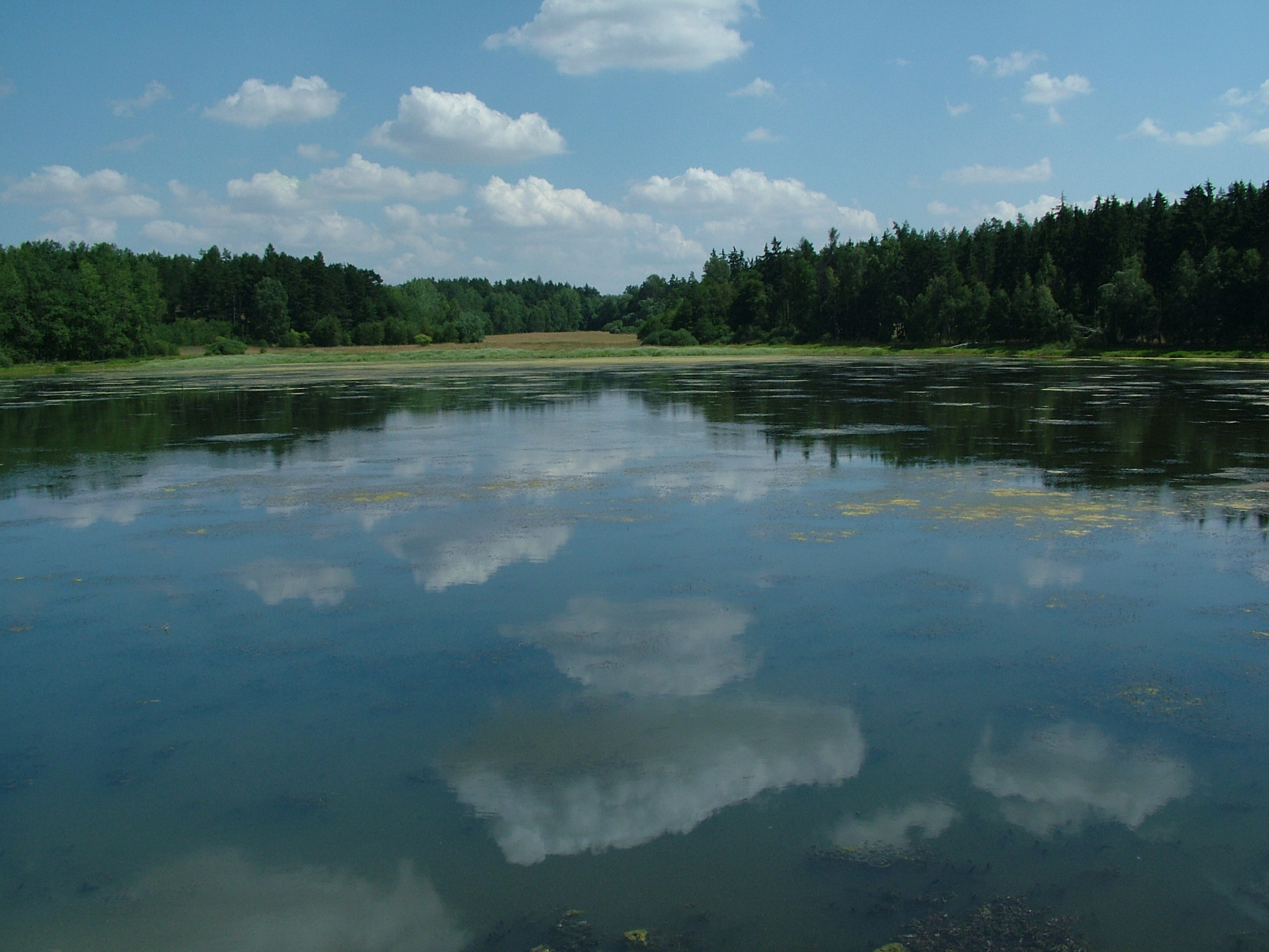 Krtský rybník u Jesenice